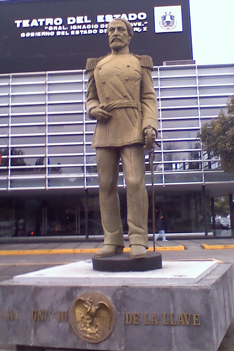 Imagen del monumento en honor al Gral. Ignacio de la LLave enfrente al teatro del estado en la capital del estado de Veracruz de Ignacio de la Llave, Xalapa de Enriques